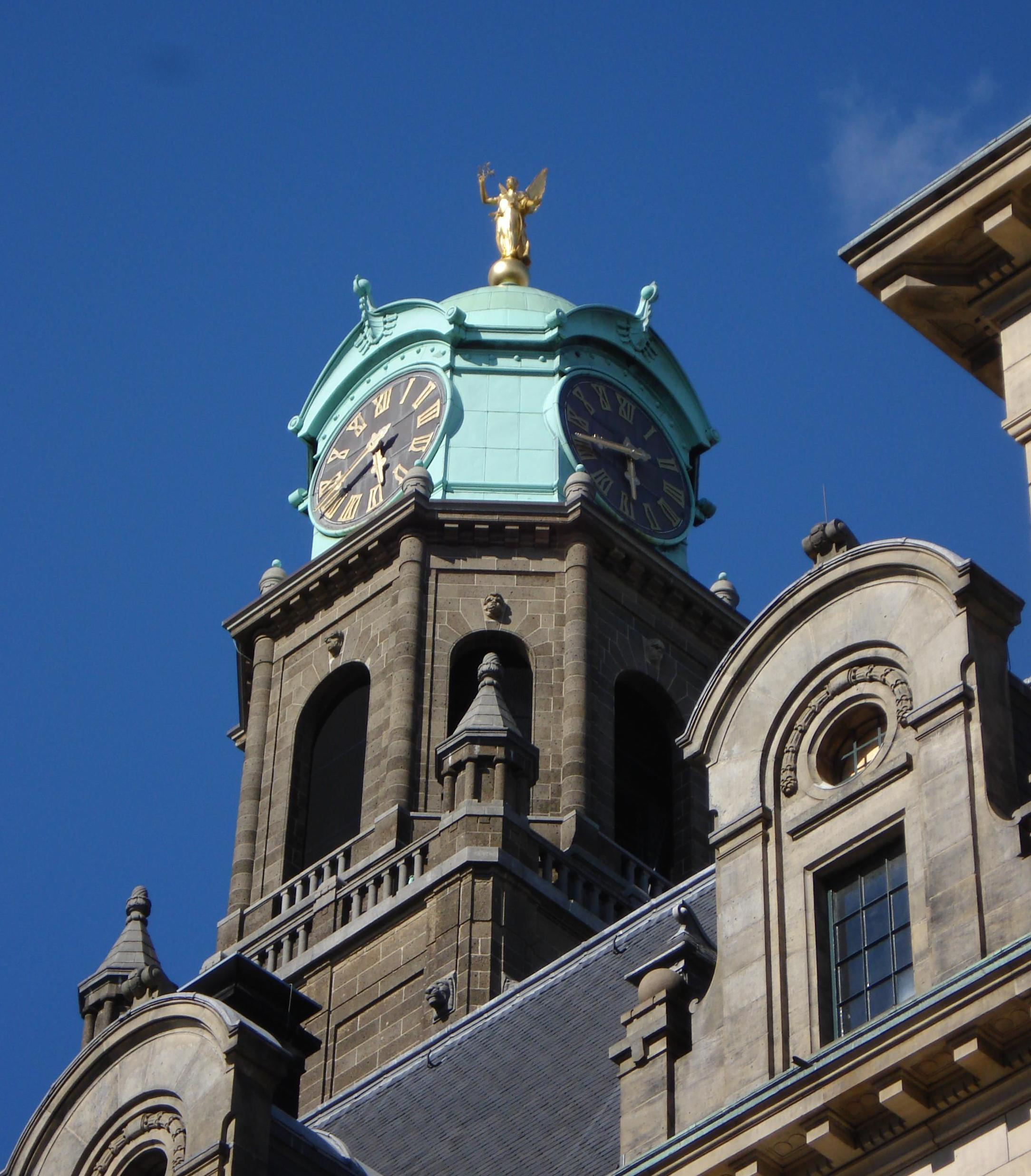 Rotterdam, stadhuis. Gouden engel. Rotterdam/The Netherlands.